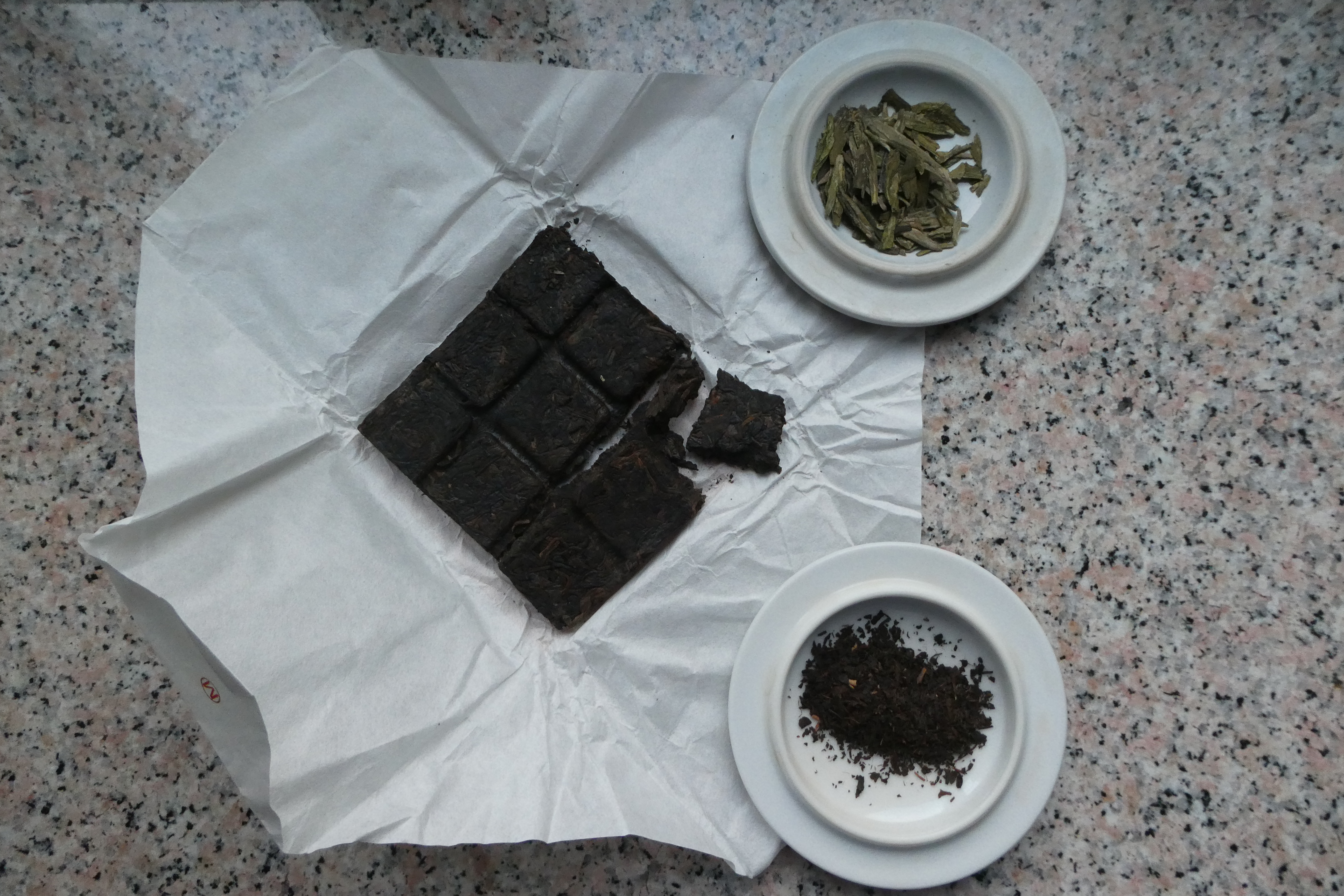 Teo. En tri formoj.